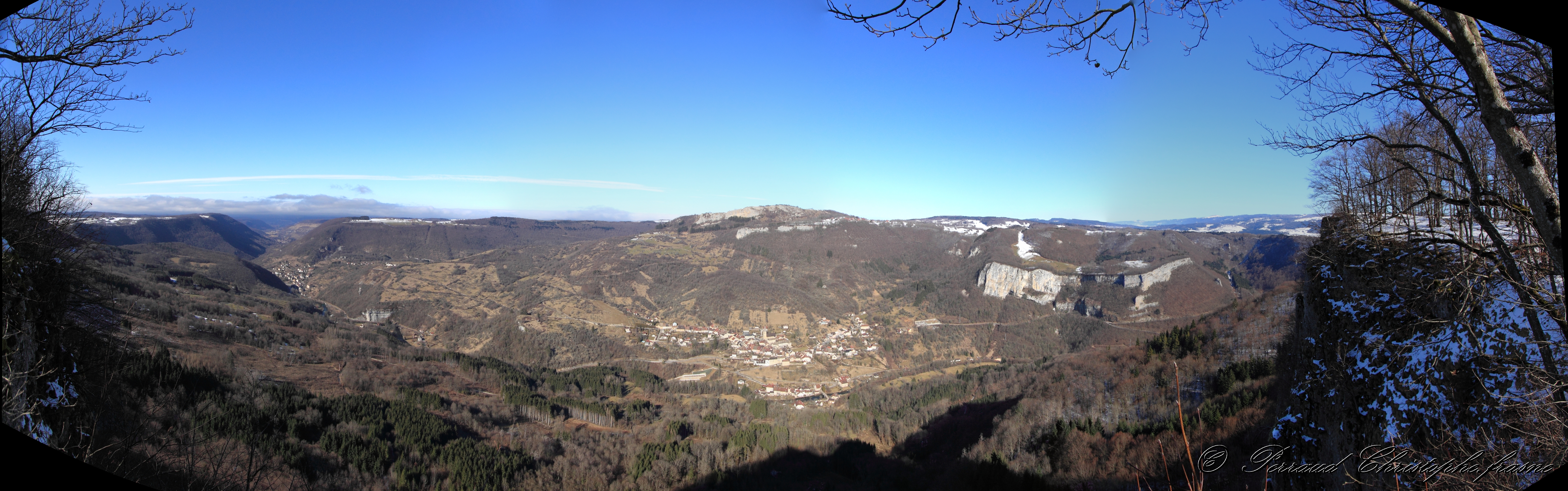 Belvédère de Renédale, doubs